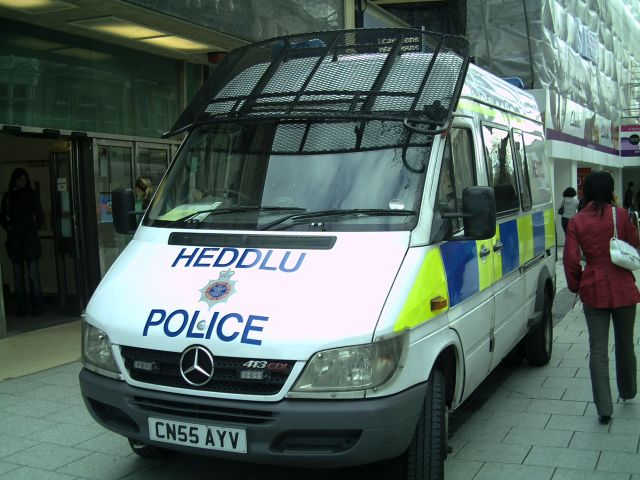 Fan heddlu, Cymru.